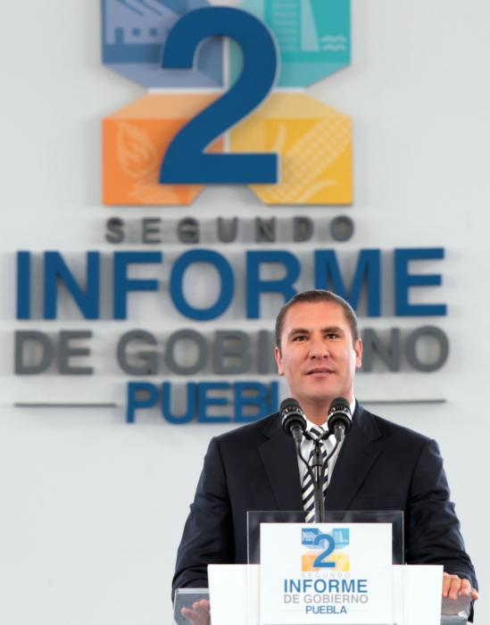 Rafael Moreno Valle, gobernador de Puebla, México.